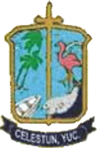 Escudo de armas del municipio de Celestún, Yucatán.